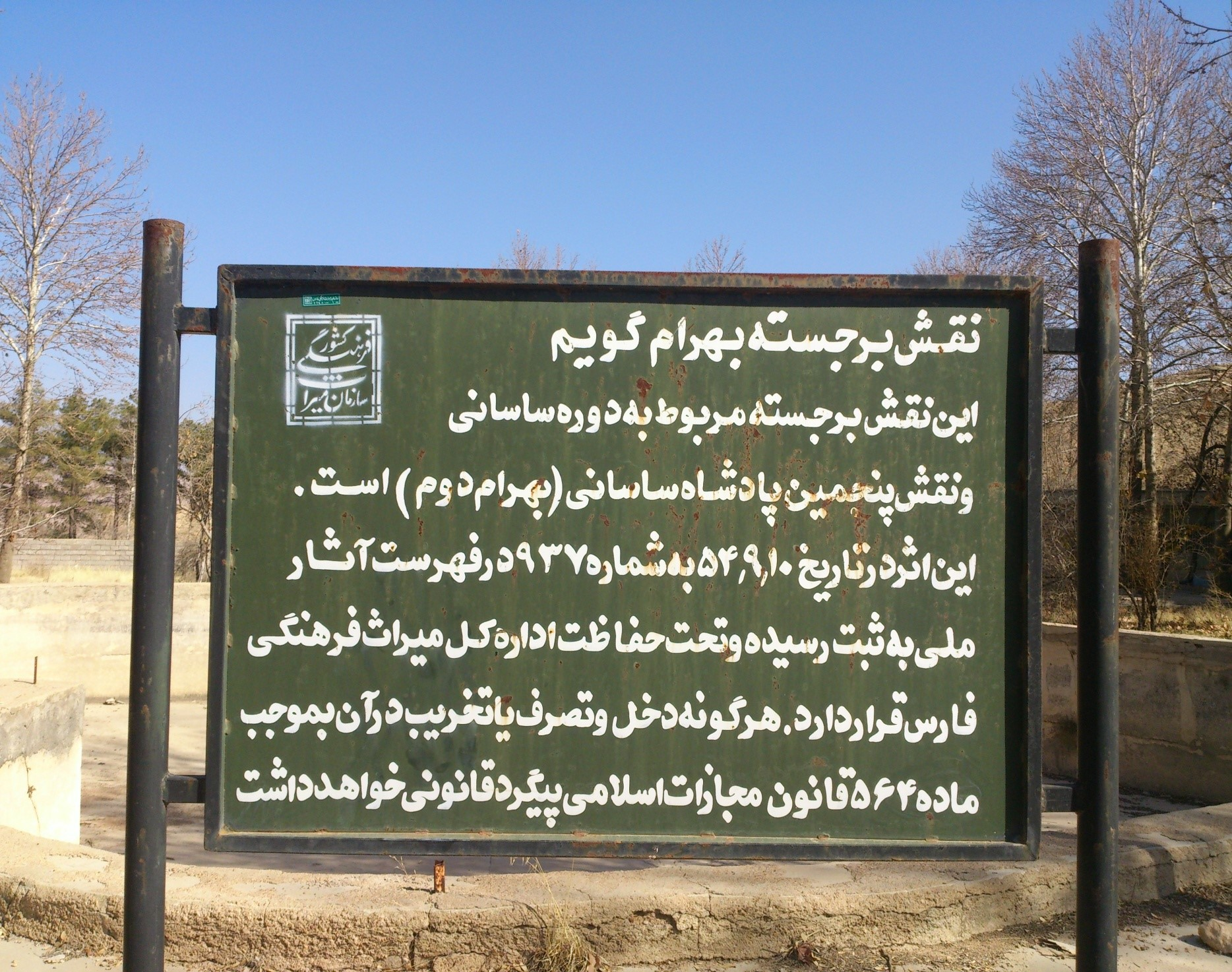 نقش برجسه بهرام دوم در حال نیایش